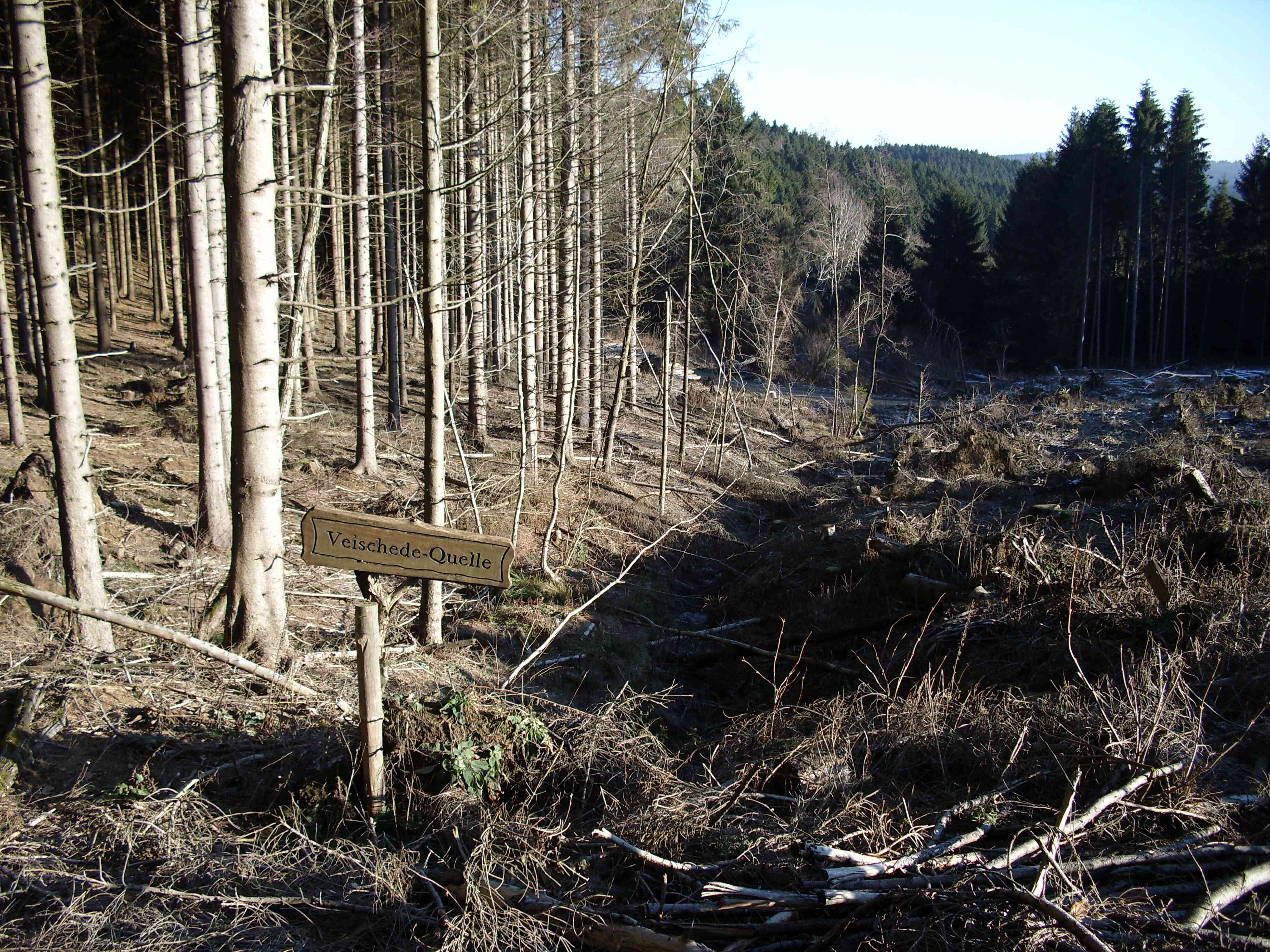 Veischede - Quelle nach Kyrill Wolfgang Poguntke, eigenes Foto Datum 23.08.2008